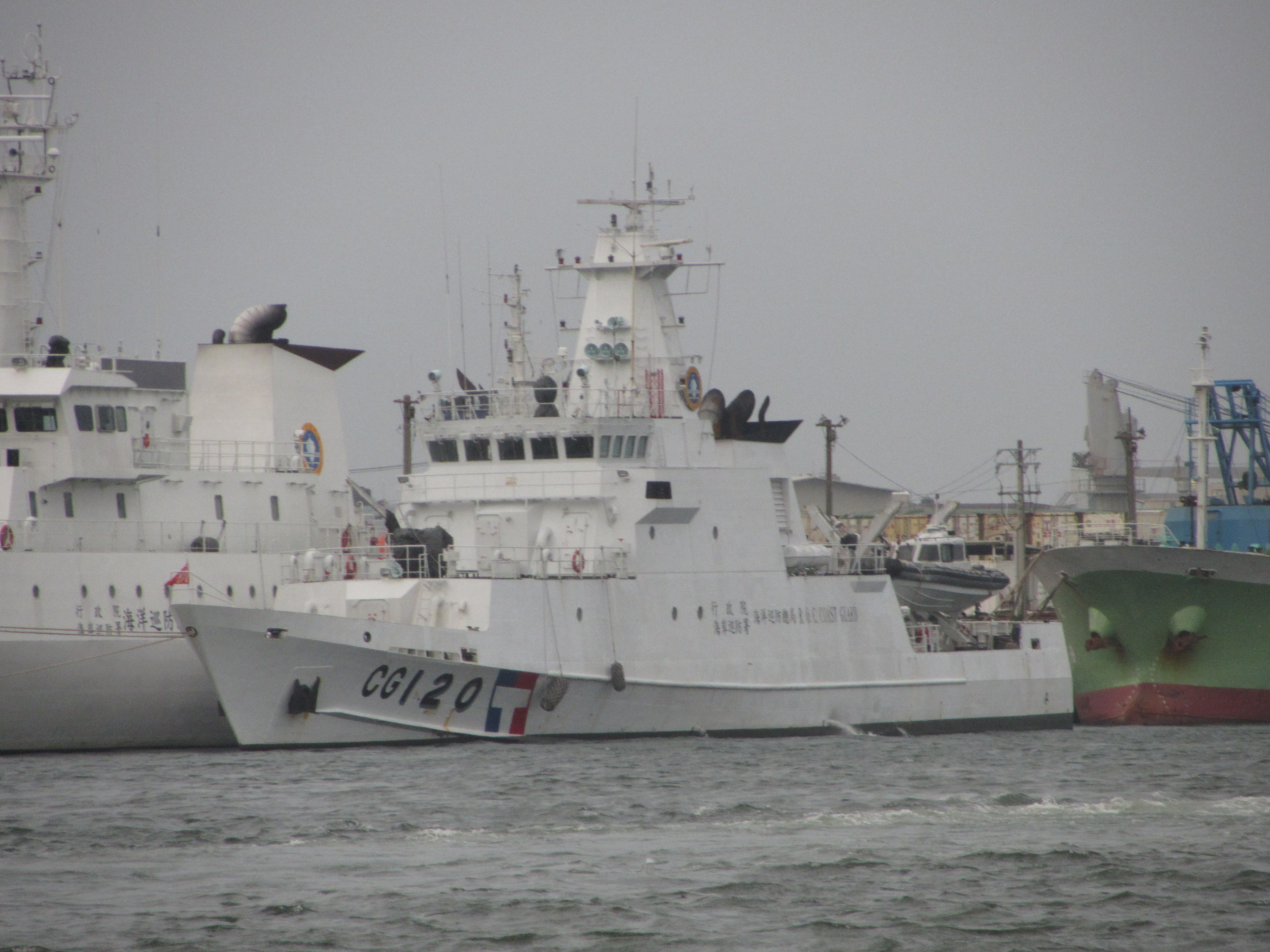 行政院海岸巡防署海洋巡防總局澎湖艦（廷星艦、CG120）